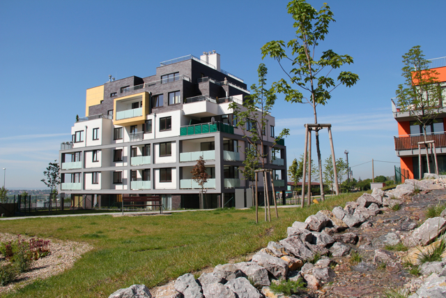 Nové domy v rámci Britské čtvrti na Západním městě